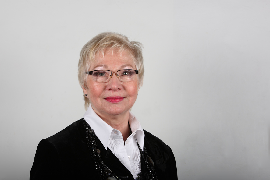 Mai Šein